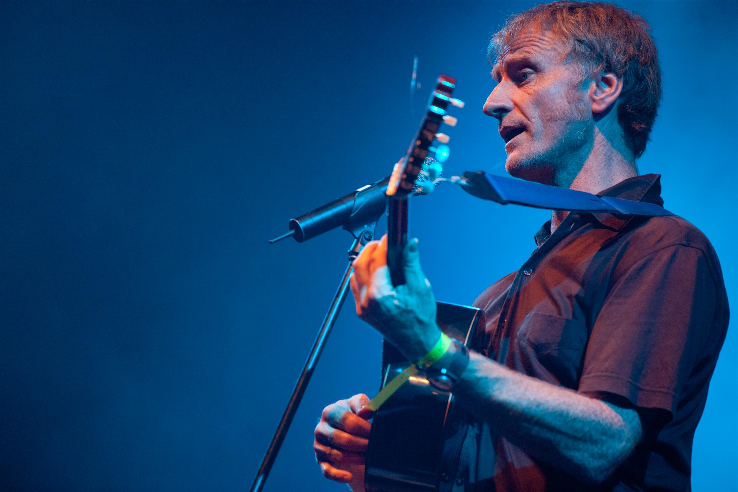 Alterna2 - Foto: Xavi Torrent